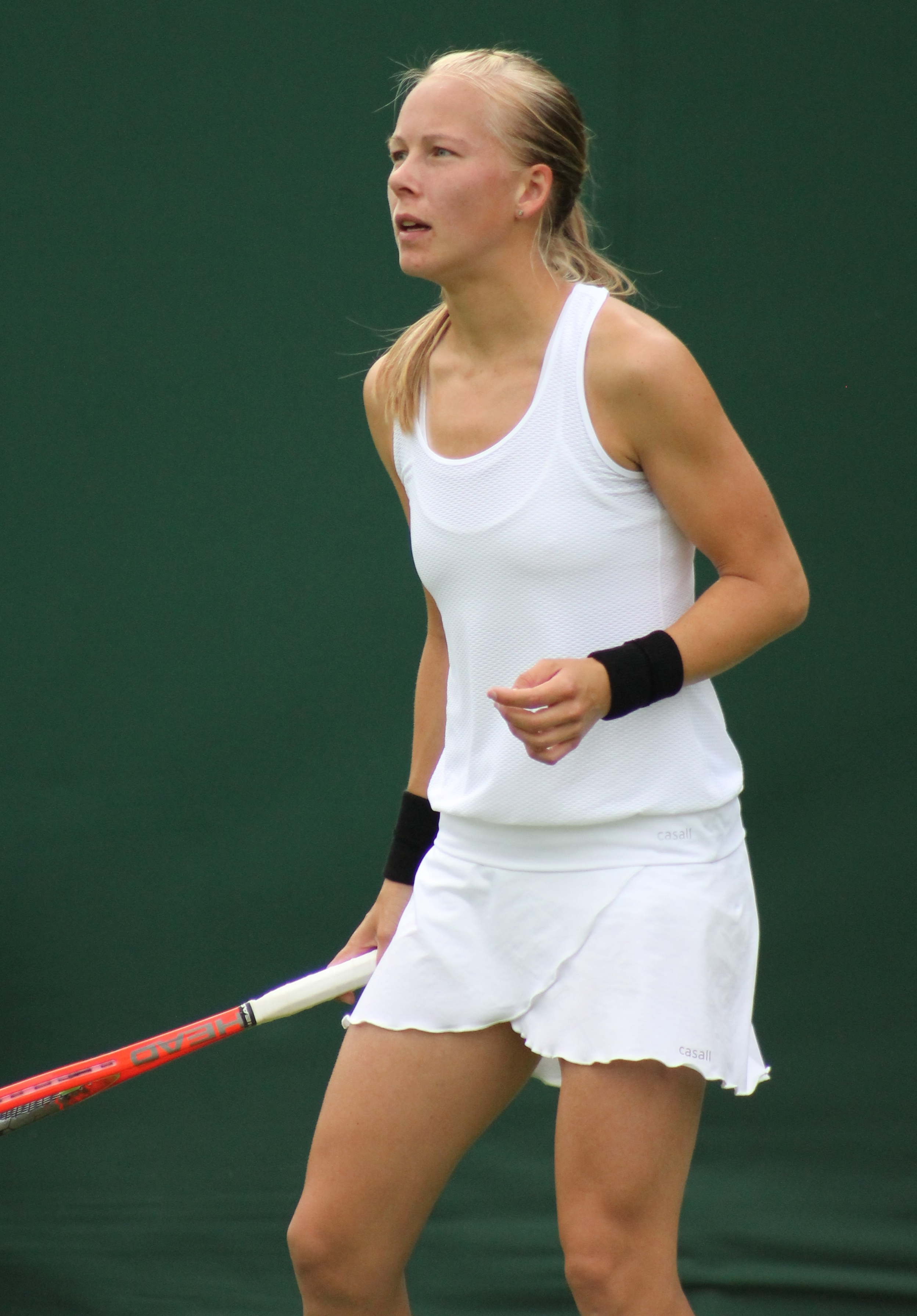 Larsson WM13